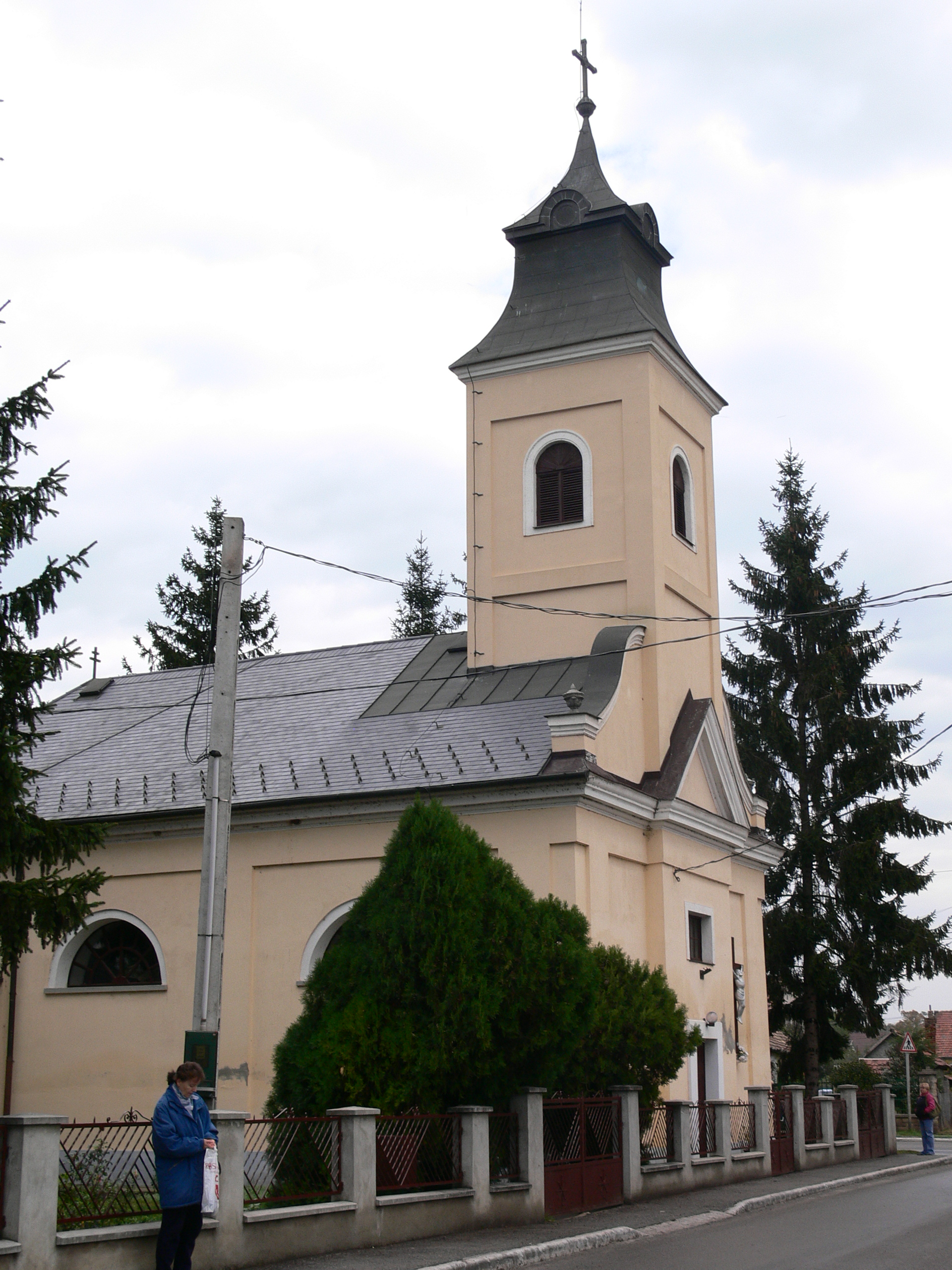 Boldvai római katolikus templom